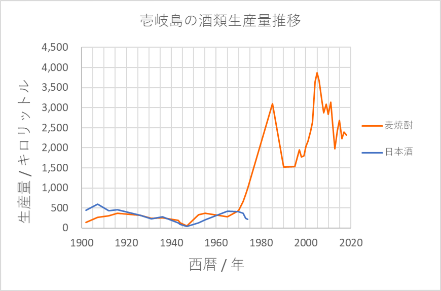 壱岐市の清酒（日本酒）および焼酎の生産量。1902～1955年は より。